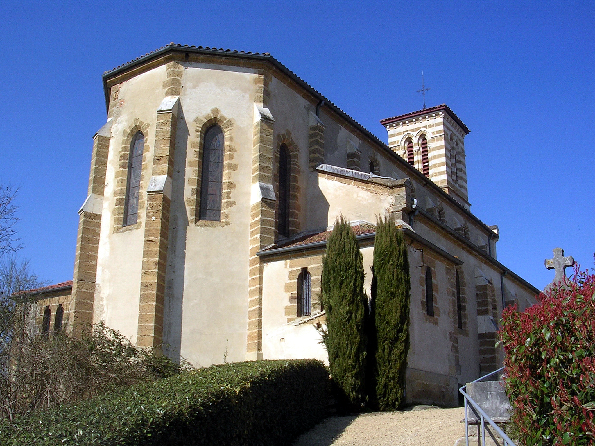 Église Saint-Vincent-de-Xaintes, à Castandet, dans le département français des Landes